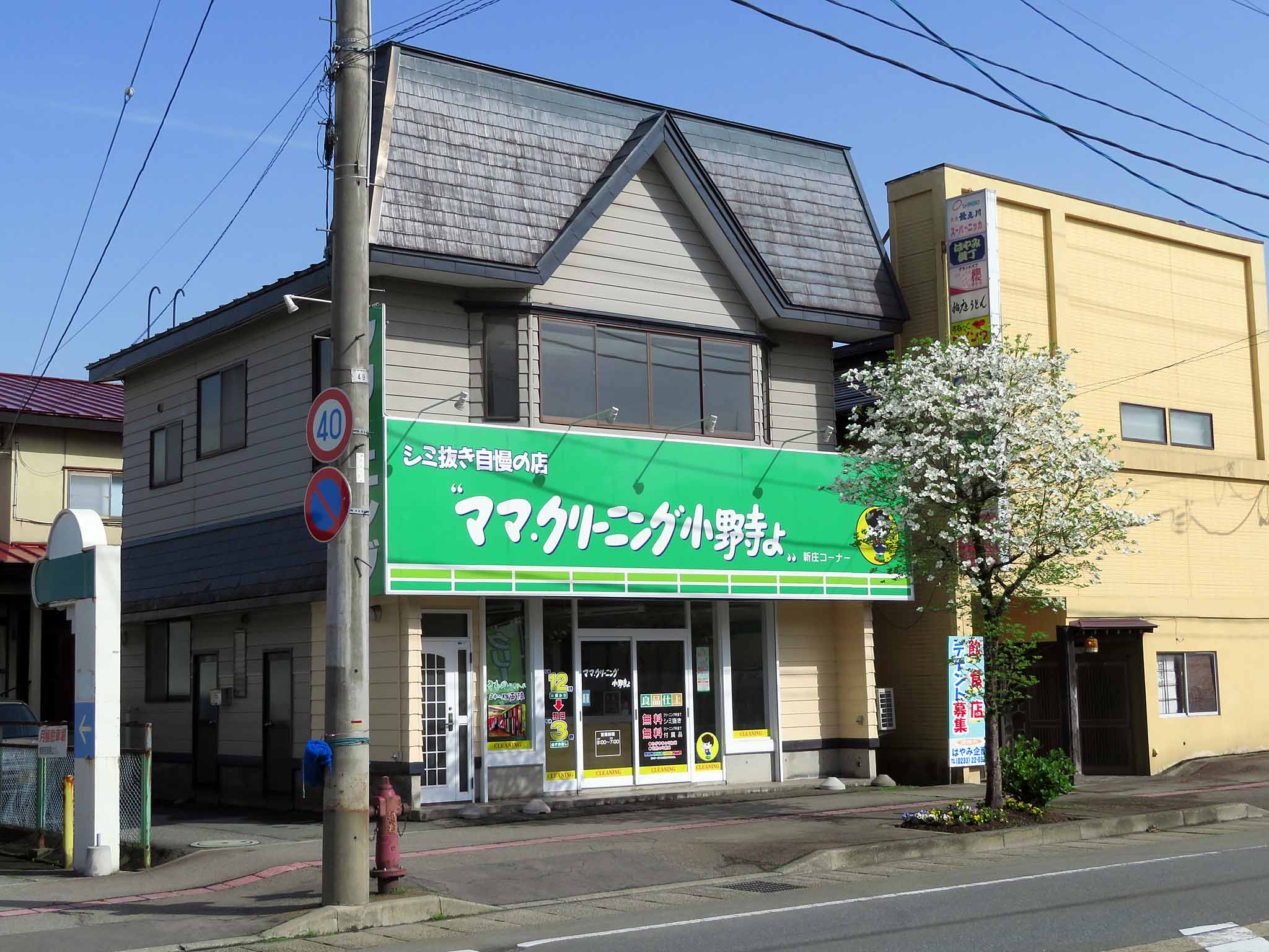 山形県を中心に展開するクリーニング店、小野寺ドライクリーニング工場「ママ、クリーニング小野寺よ」新庄市内の店舗の例。 Canon PowerShot SX720 HS